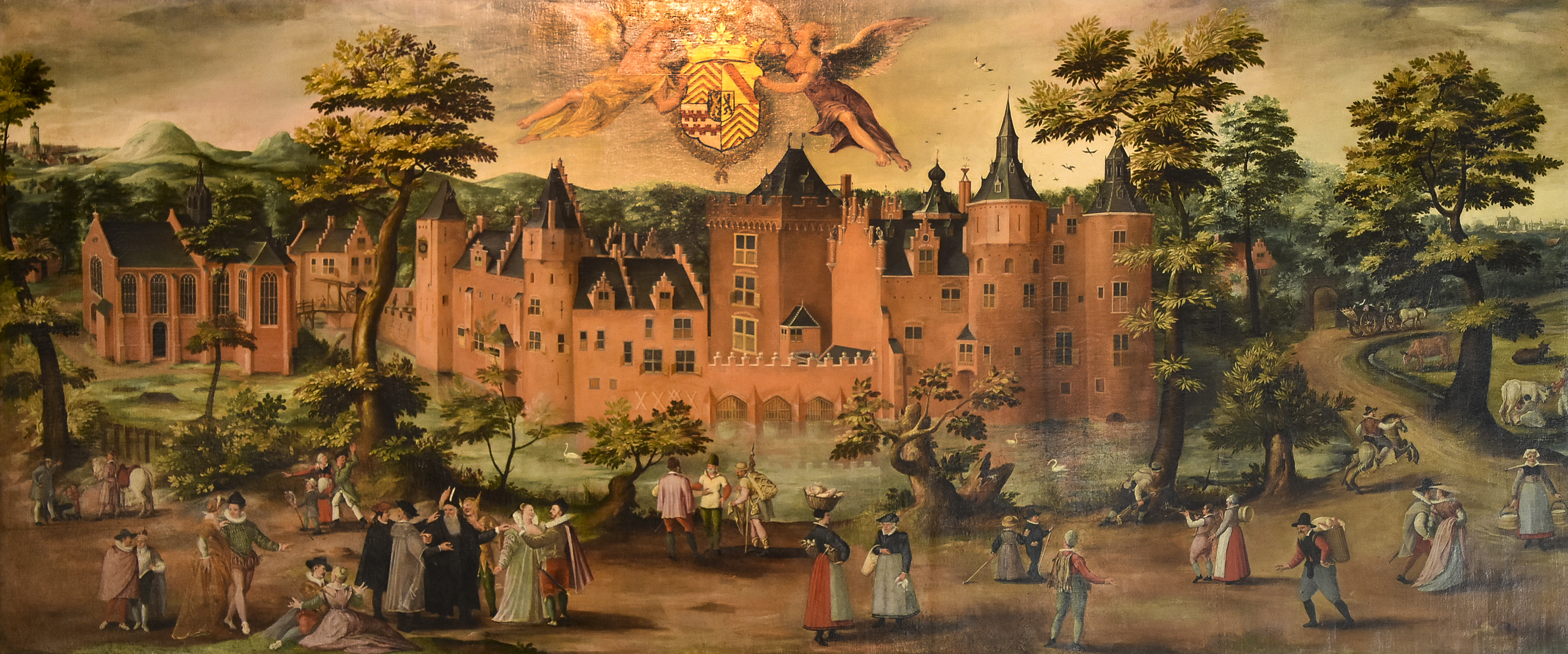 Gillis de Saen (actief1580-1610) Het Kasteel Egmond-aan-den-Hoef (ca.1570) Stadhuis van Zottegem 1-09-2018 This photo of movable heritage has been taken in the Flemish Region